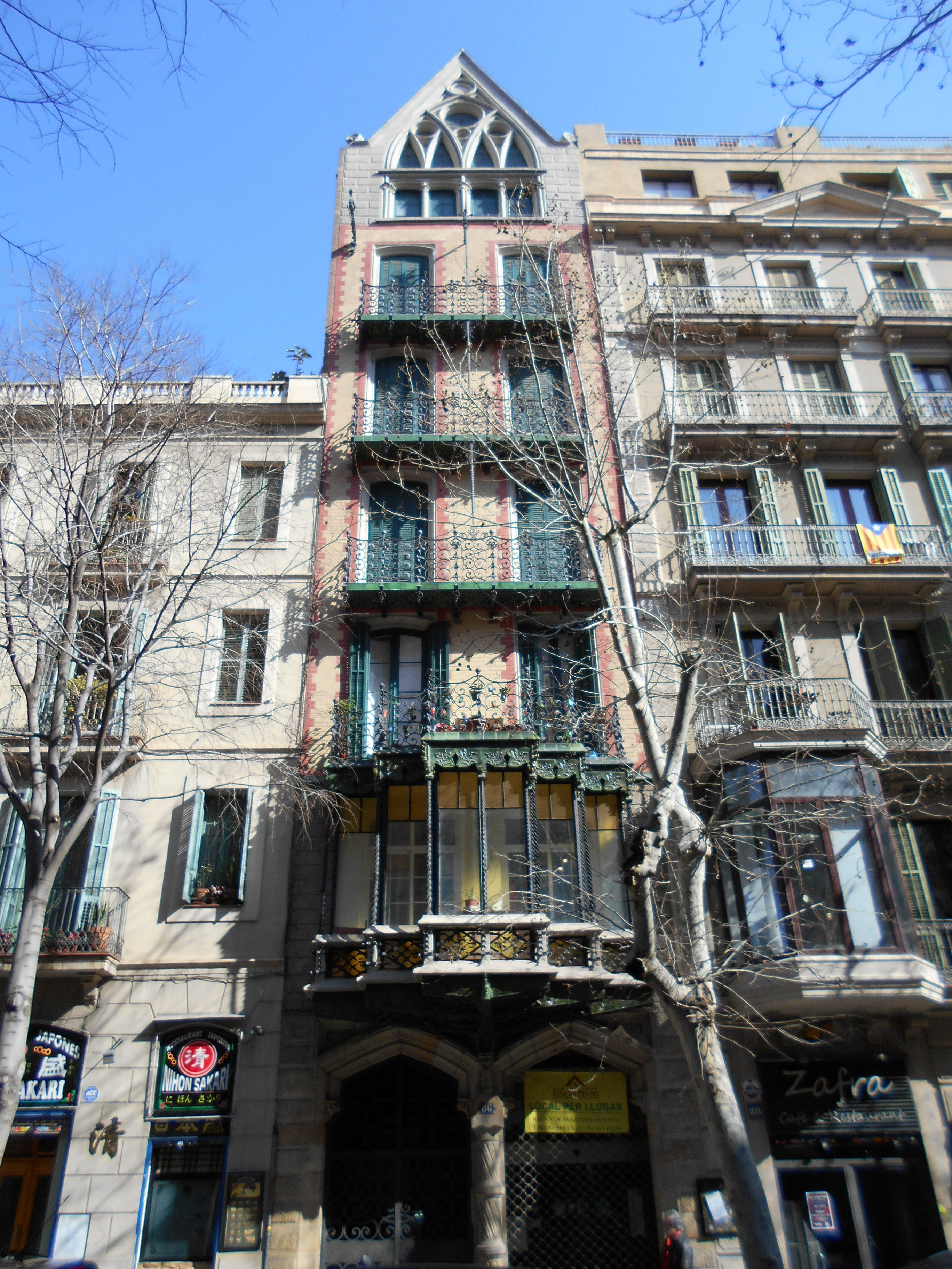 Casa Pomar, de Joan Rubió (Barcelona, Cataluña).